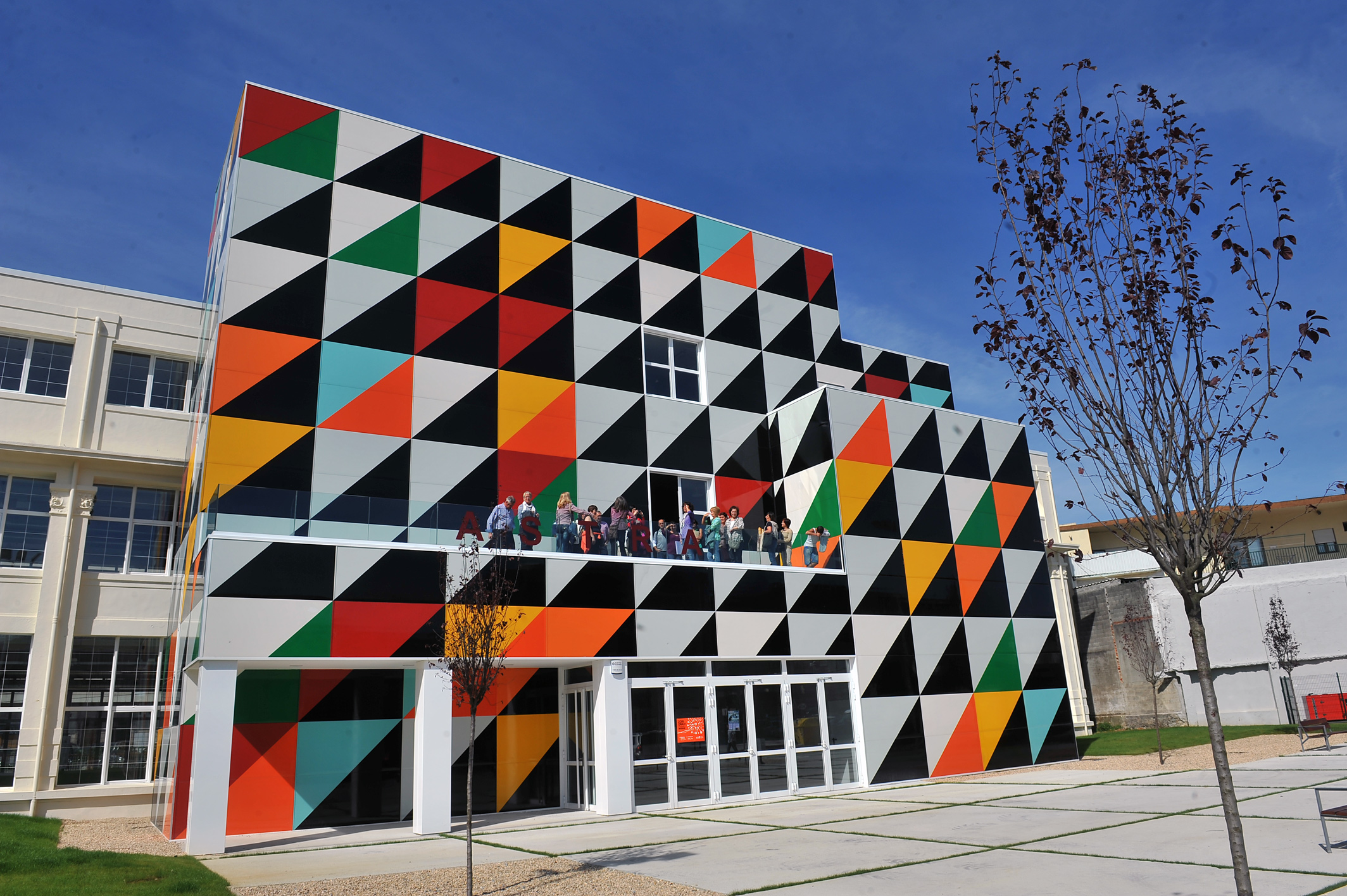 Fábrica Astra, antigua fábrica de armas reconvertida en fábrica de creación cultural. Nuevo anexo proyectado por el artista inglés Liam Gillick